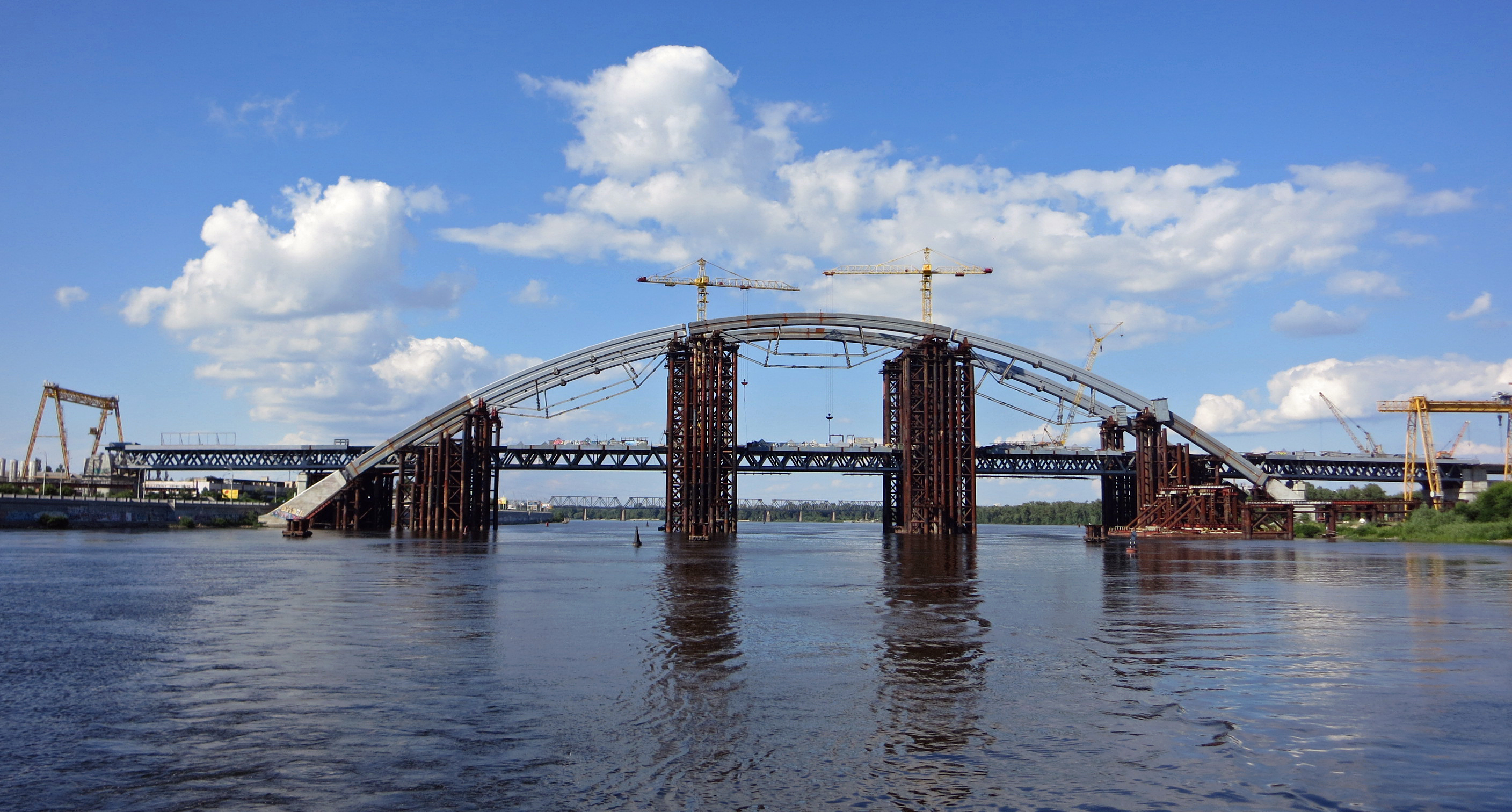 Стан мосту у липні 2014 р після встановлення останньої арки